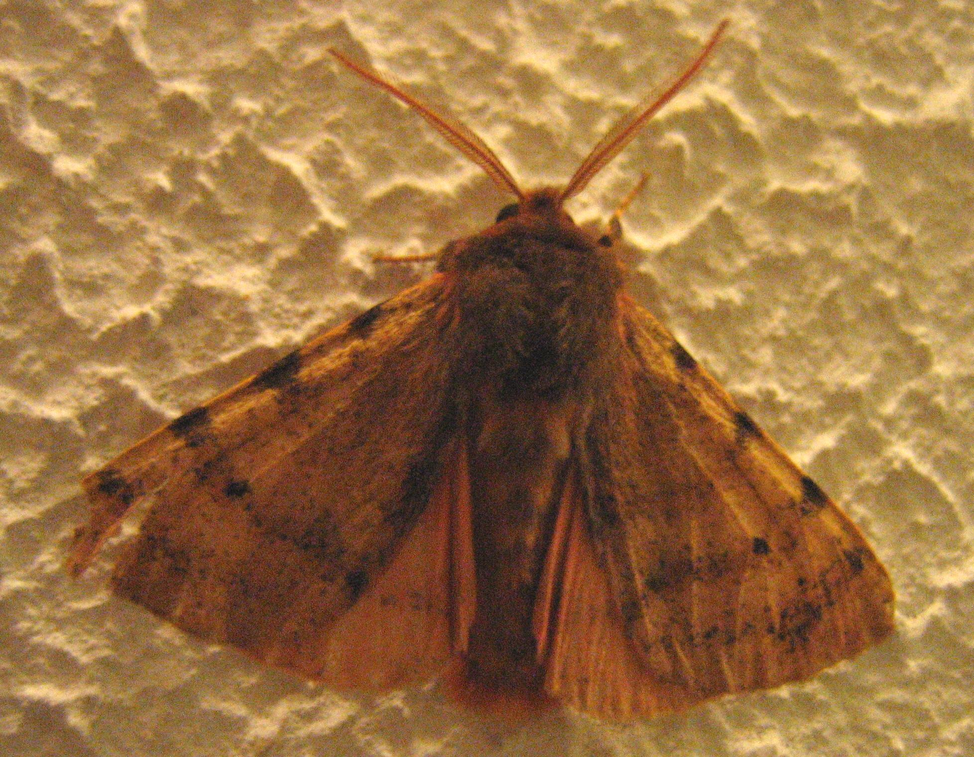 Canararctia rufescens, Nordküste, nahe Puerto de la Cruz, Teneriffa